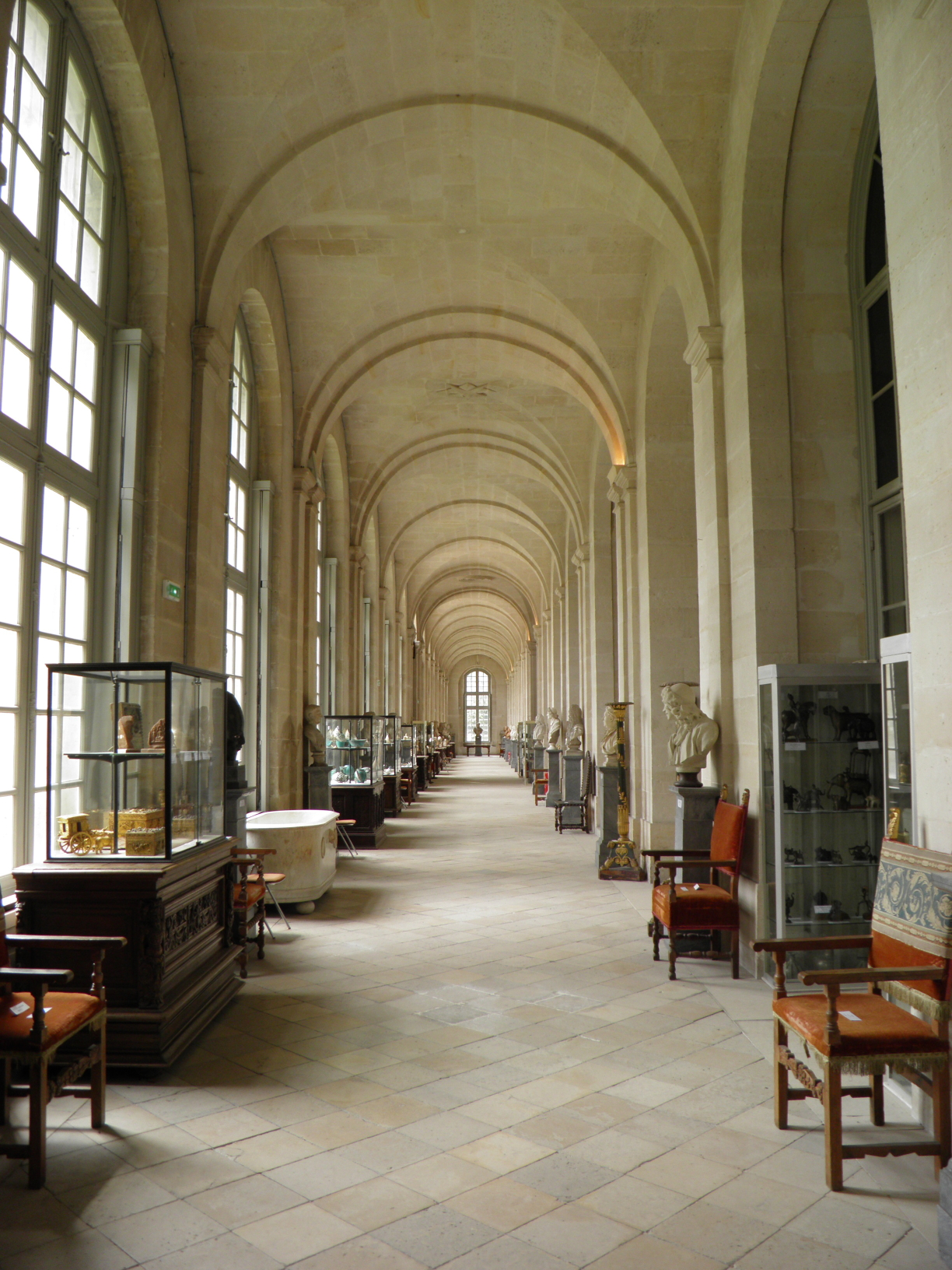 Extrémité est de la Grande Galerie du château-musée de l'abbaye de Chaalis